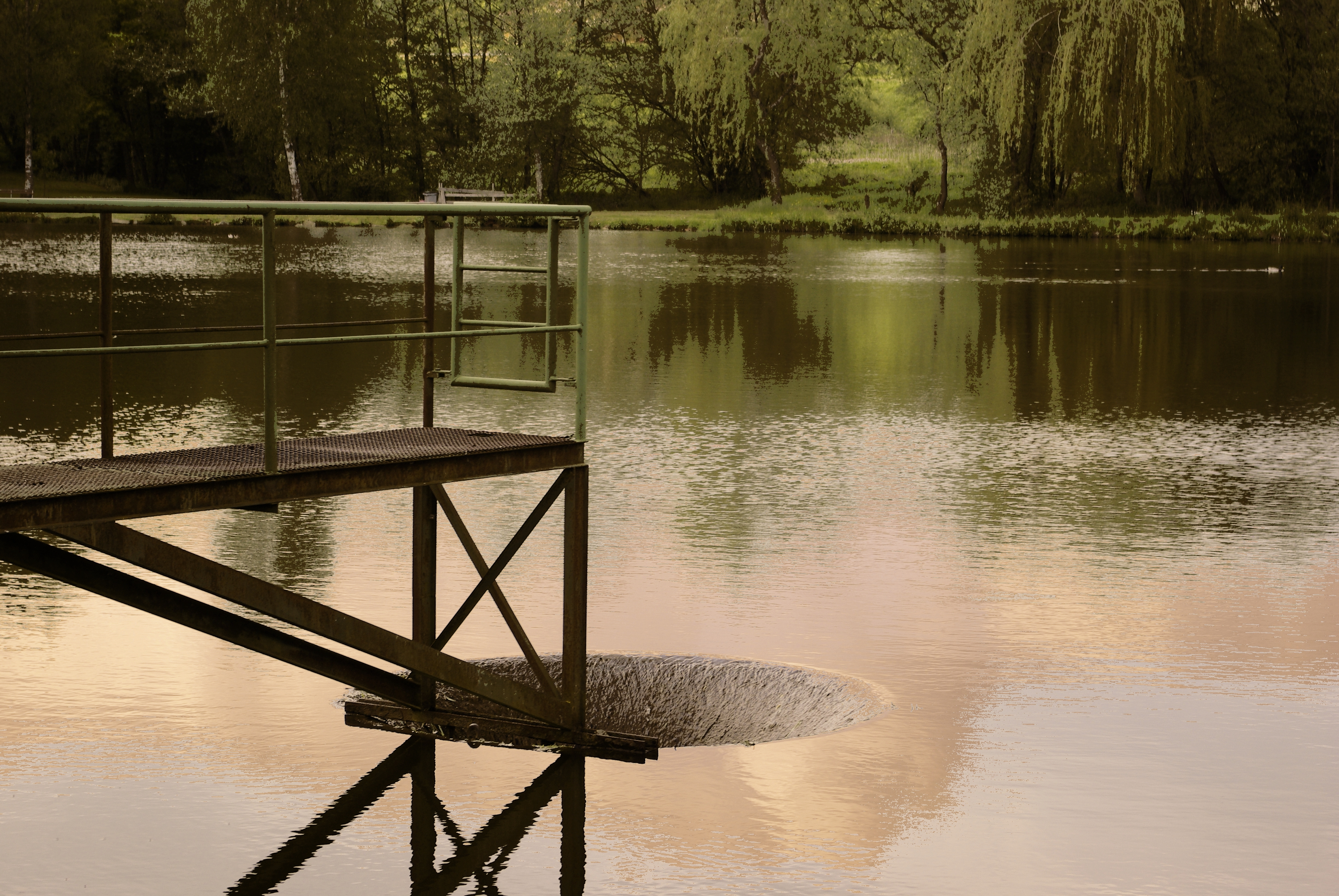 Plan d'eau de Poule-lès-Écharmeaux (69870), vallée d'Azergues, Beaujolais Vert, département du Rhône (69), en France.